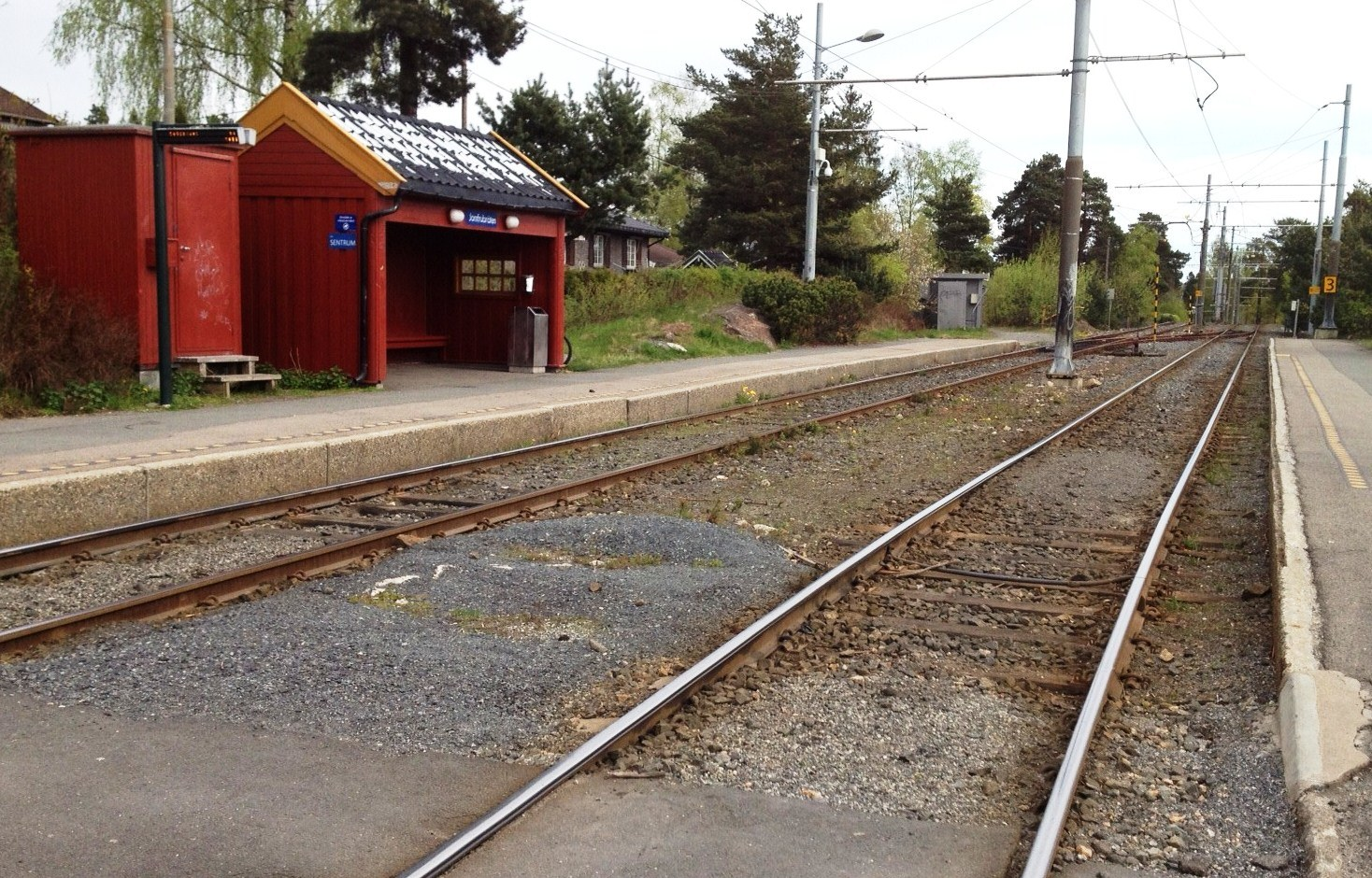 Jomfrubråten holdeplass, Ekebergbanen, Oslo